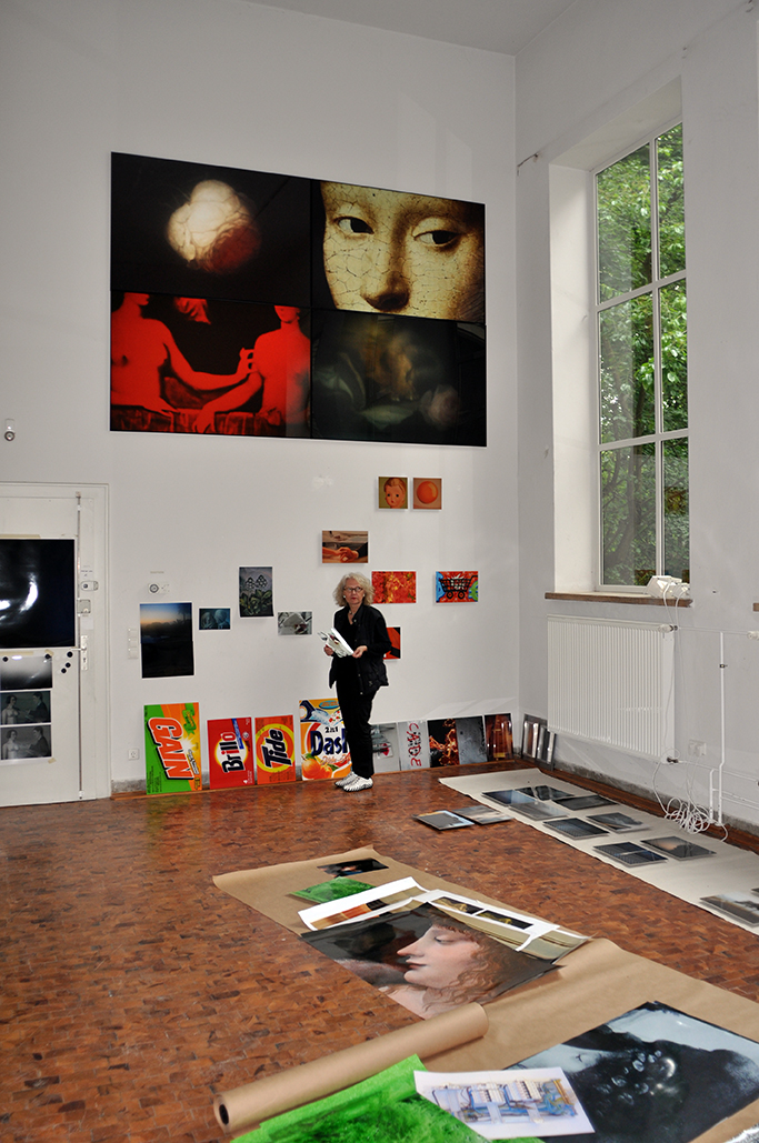 Elfi E. Fröhlich im Atelier Käuzchensteig, Berlin © Philipp Hort